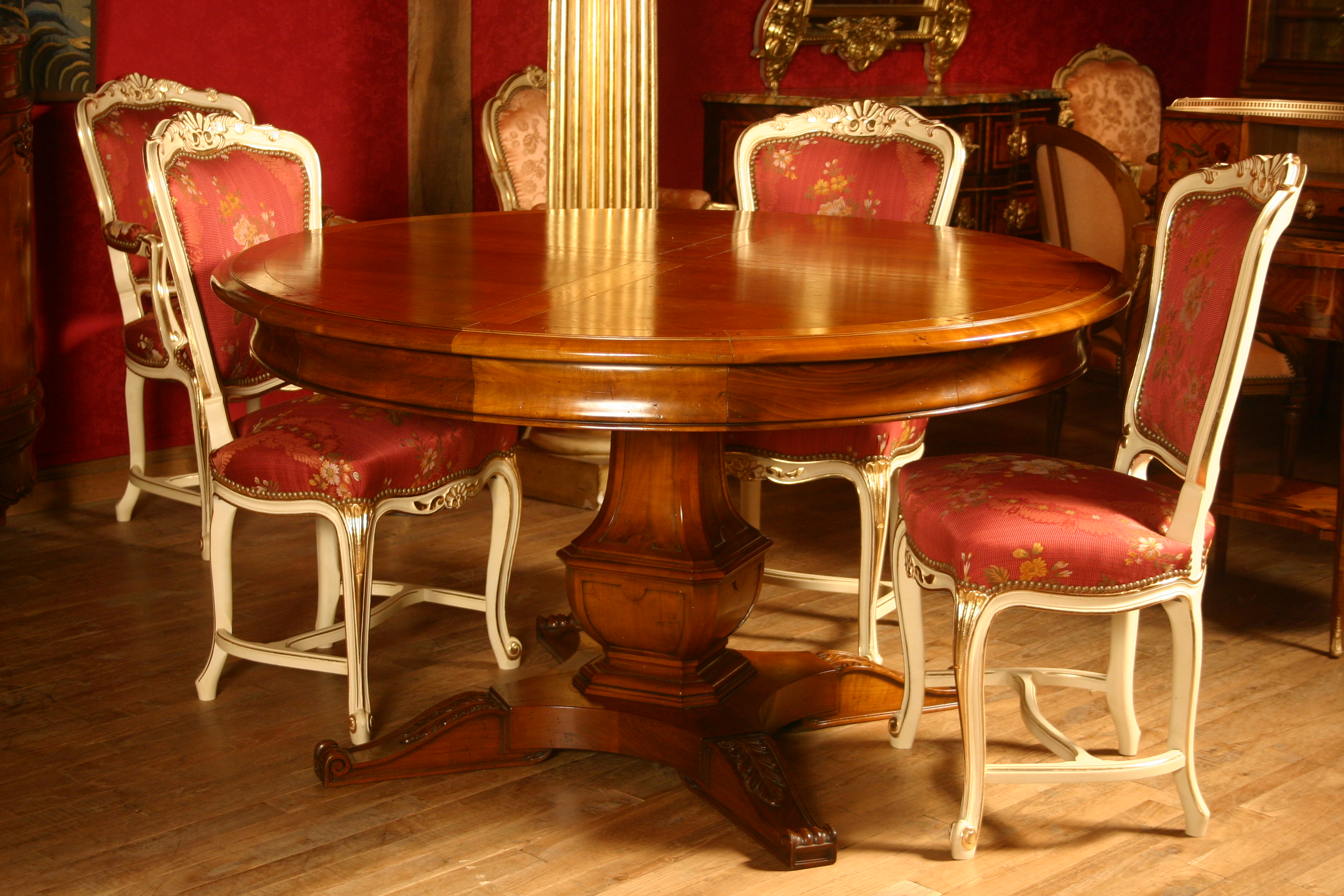 Table de séjour de style Louis XIV reproduite d'après une esquisse d'époque réalisé par les Ateliers Allot Frères.